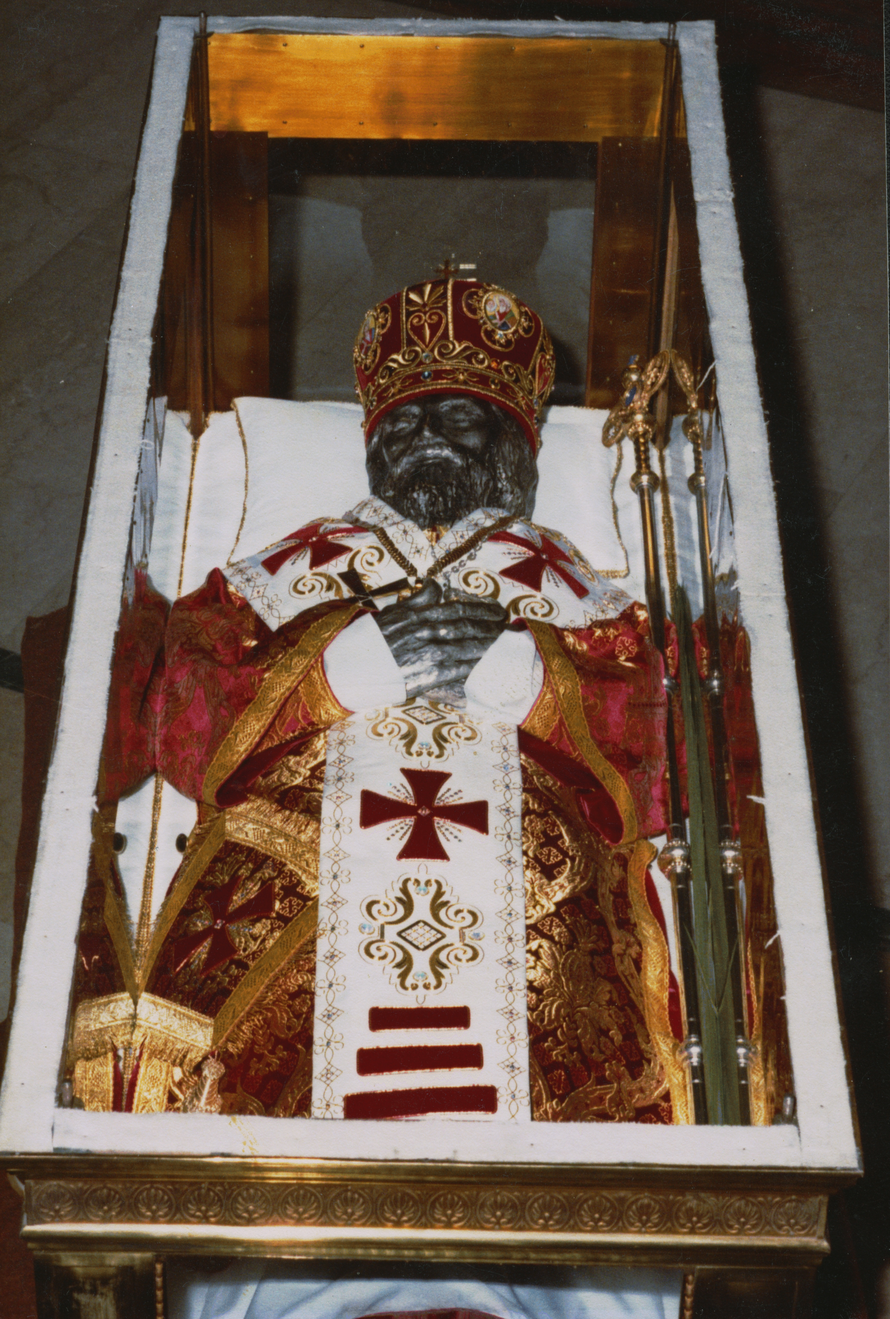 Нетрадиційна фото Йосафата, 80те роки 20го століття